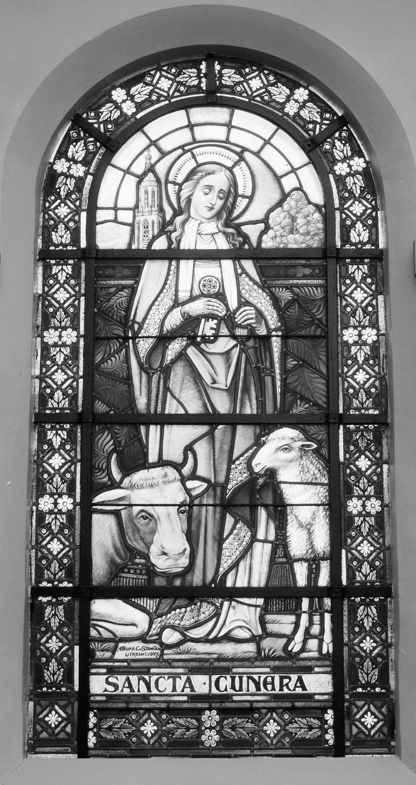 ROOMS-KATHOLIEKE KERK (HEILIGE MICHAEL): INTERIEUR, glas-in-lood, HEILIGE CUNERA